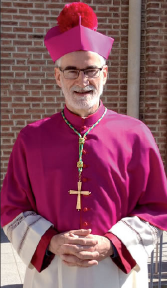 Sua Ecc.nza Mons. Marco Arnolfo - Arcivescovo Metropolita di Vercelli